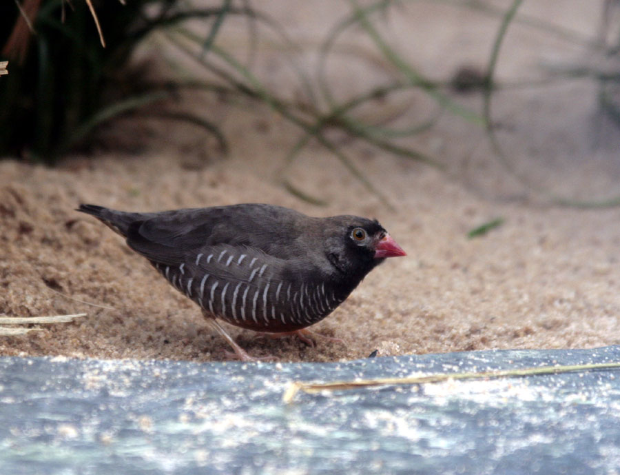 Wachtelastril (Männchen)